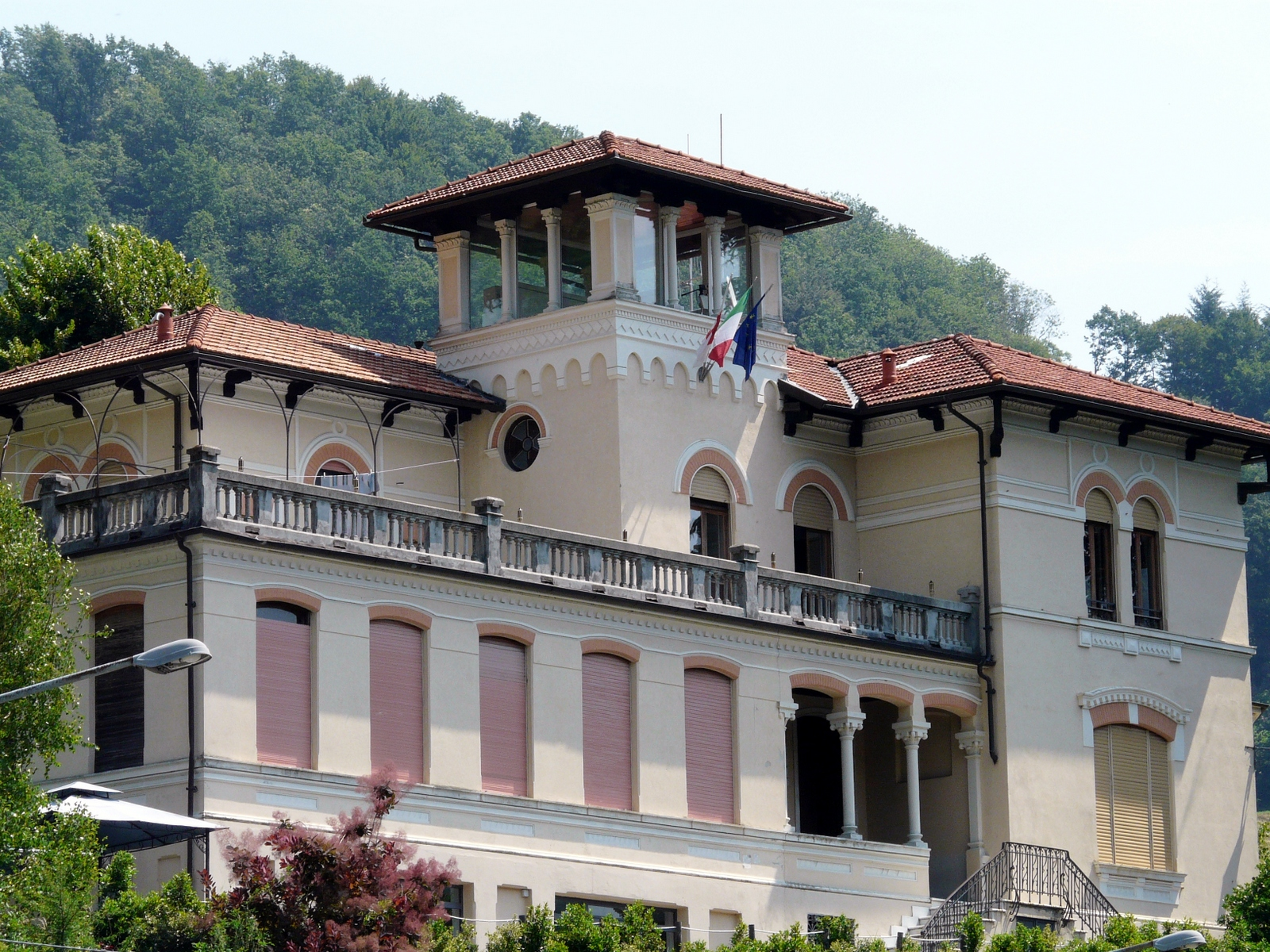 Villa Bagnara, Masone, Liguria, Italia